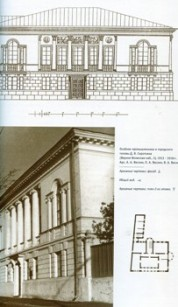 Дом Д.В.Сироткина, Верхне-Волжская наб, 3